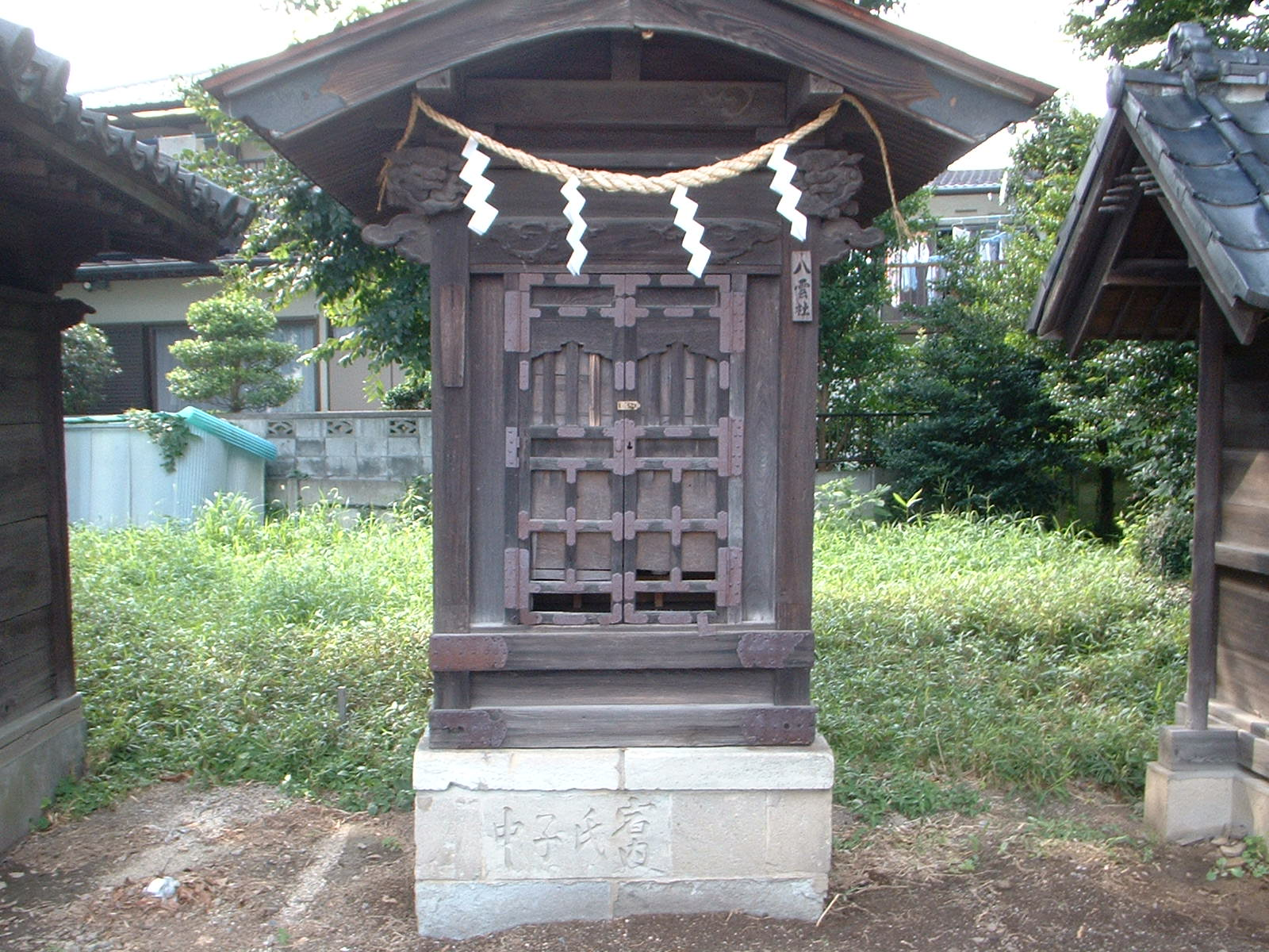 中山道にあった市神社をここに移した。桶川祇園祭はこの神社の例祭。